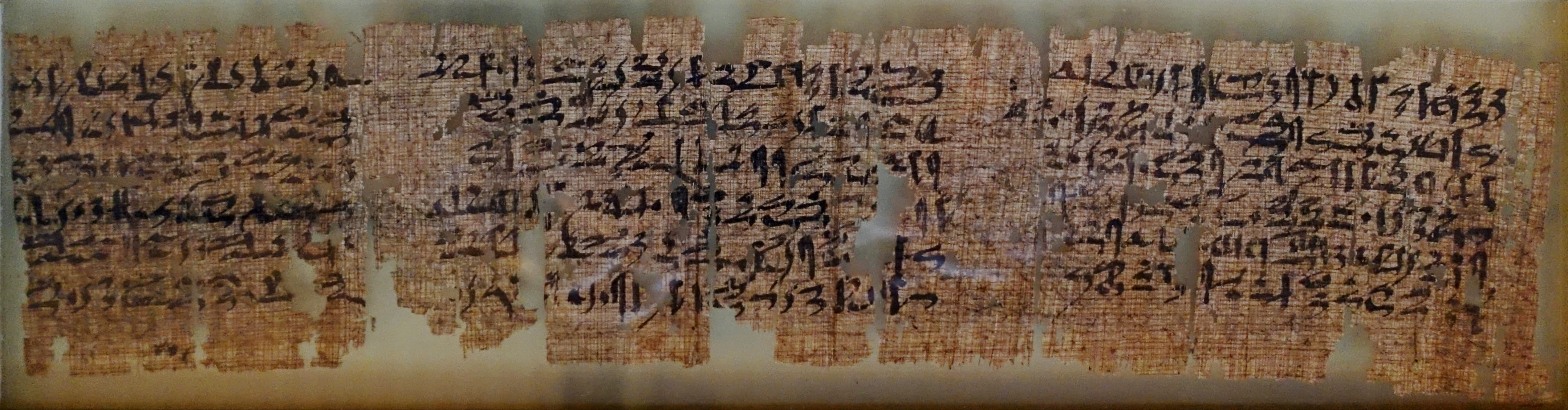 Geschichte des Sinuhe, kleines Format, hieratisch (Mittleres Reich, 12.–13. Dynastie, 1976–1648 v. Chr.) aus Theben-West; Papyrus P 10499 B, Zeilen 13–30, Neues Museum, Berlin, Deutschland